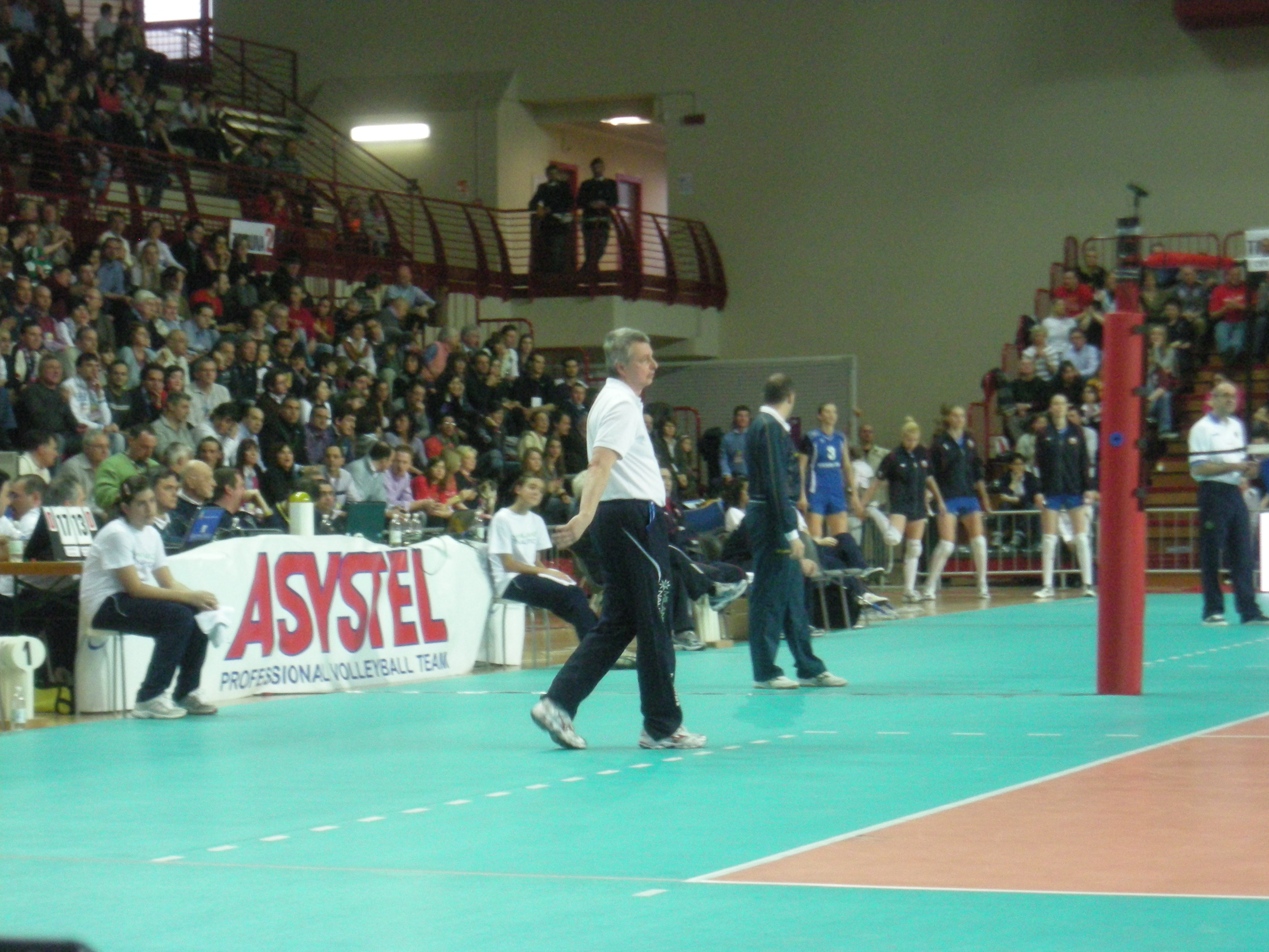 L'allenatore Luciano Pedullà